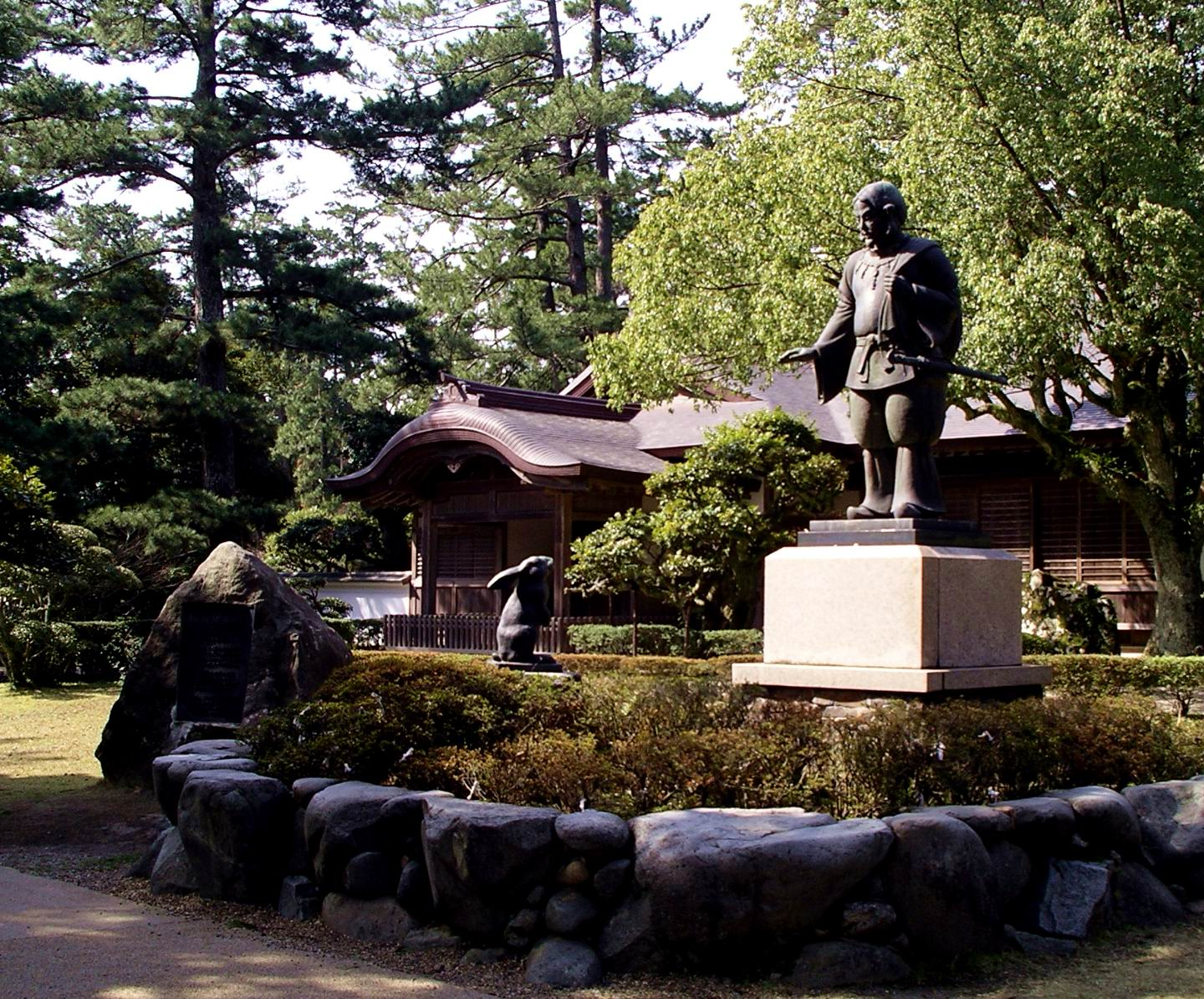 Izumo Taisha, Shimane.出雲大社